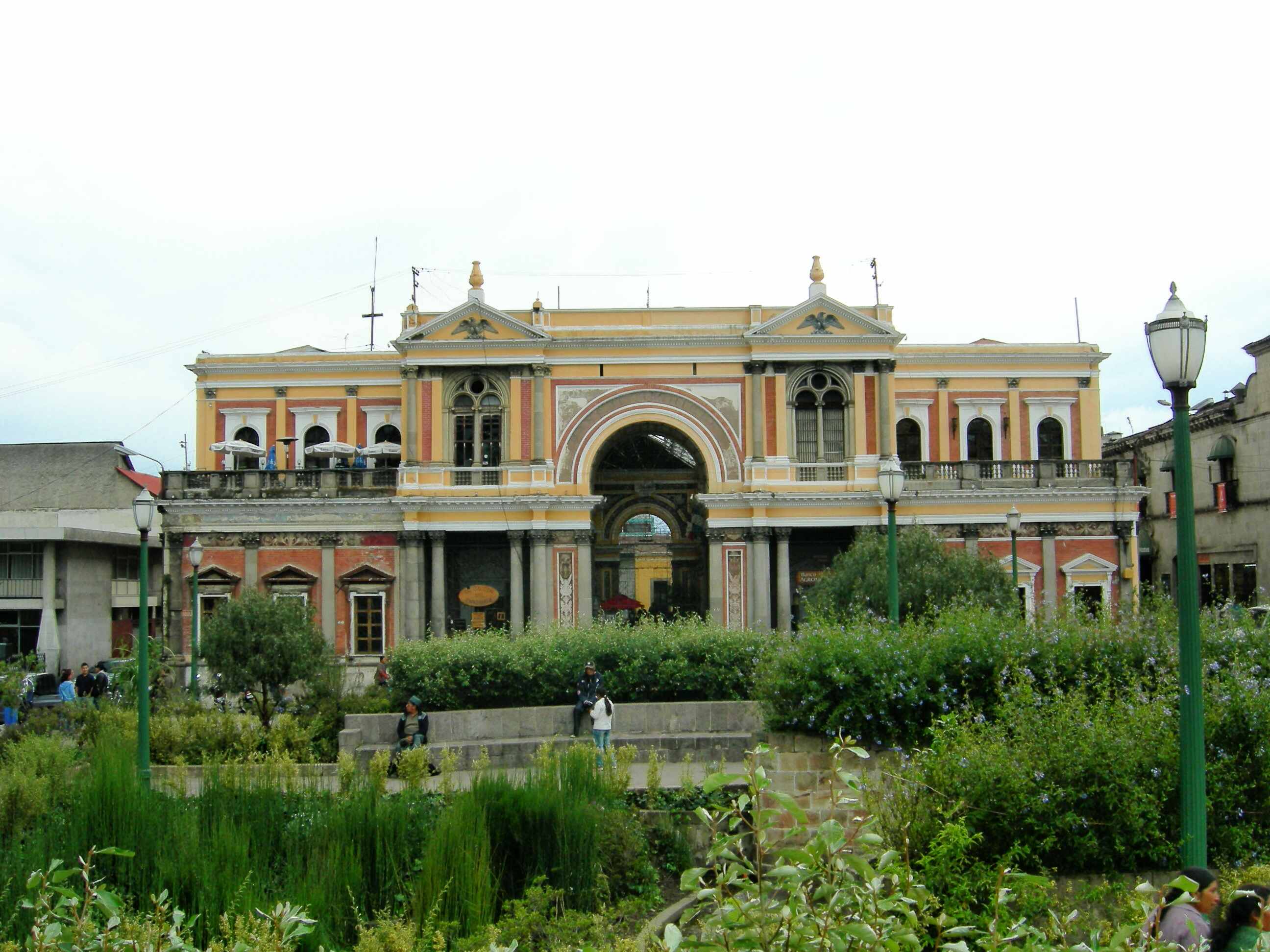 Parque Central, Quetzaltenango (Xela) Guatemala